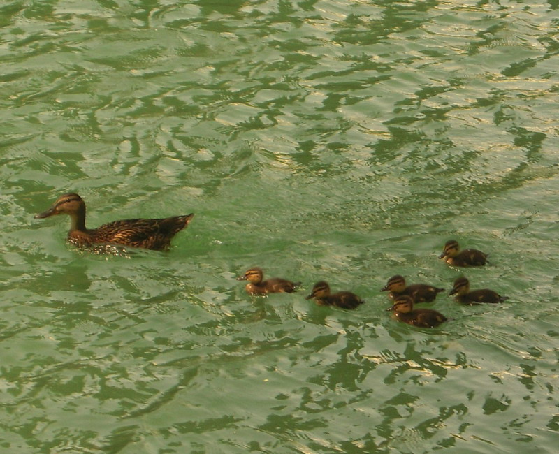 Patke u rijeci Vrbas (Banja Luka)